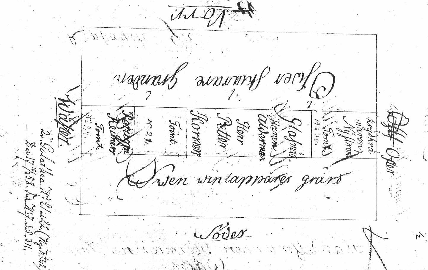 Tomtkarta för kvarteret Galatea 1758